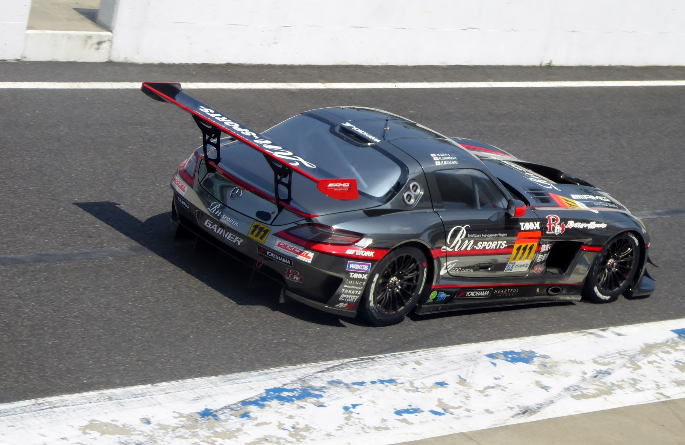 2015年度鈴鹿タイヤテストにおいて111号車Rn-SPORTS GAINER SLSを撮影。